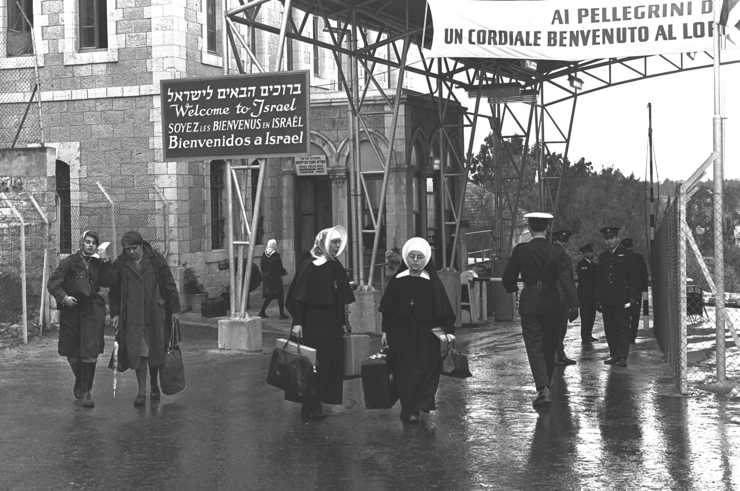 מעבר מנדלבאום